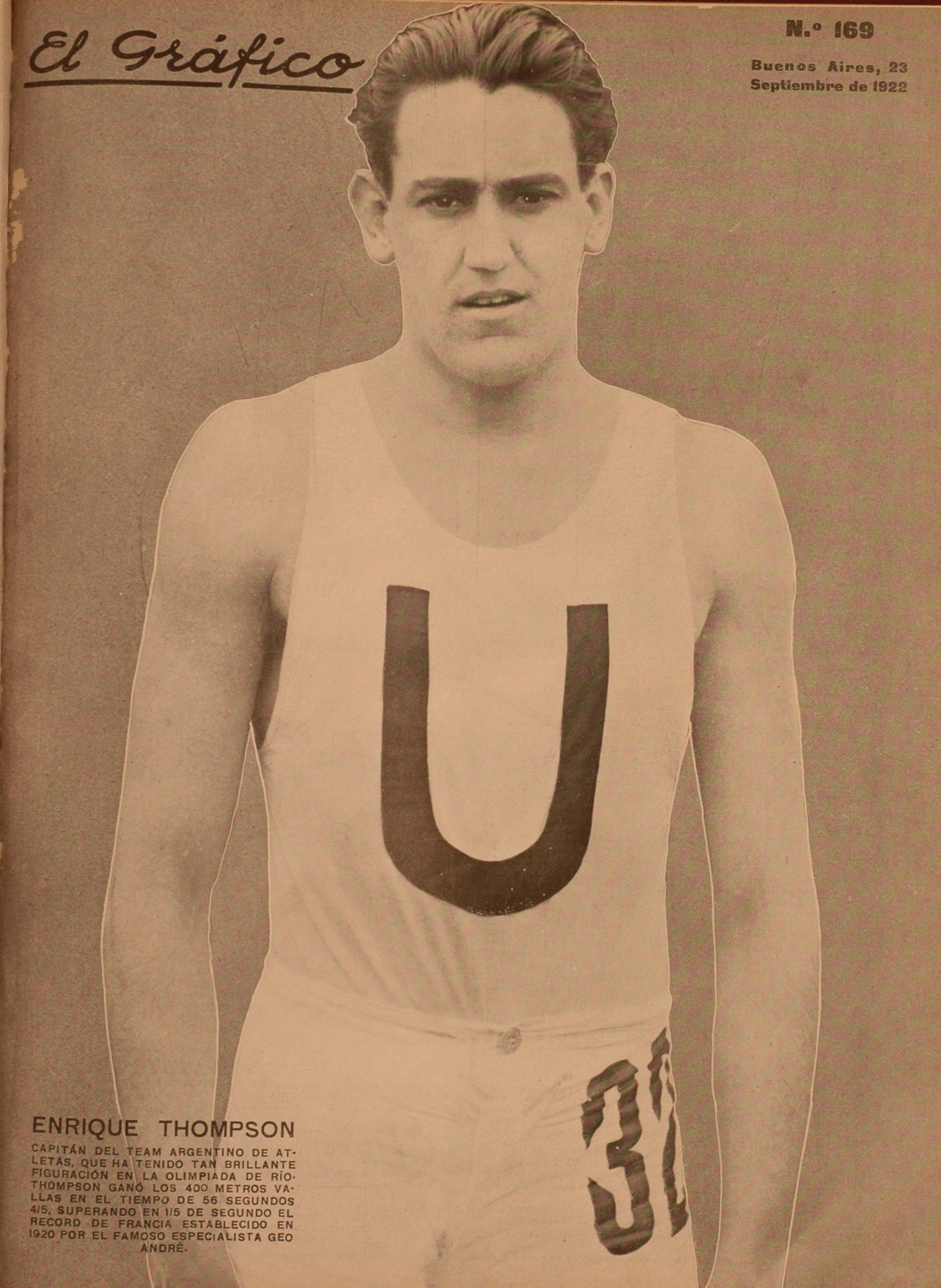 El Grafico del 23 de Septiembre de 1922. Edicion 169